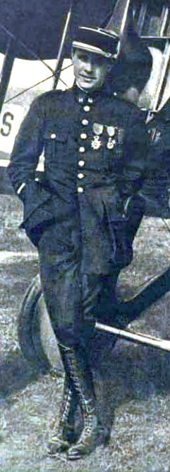 Georges Estienne, as des as de la reconnaissance aérienne.